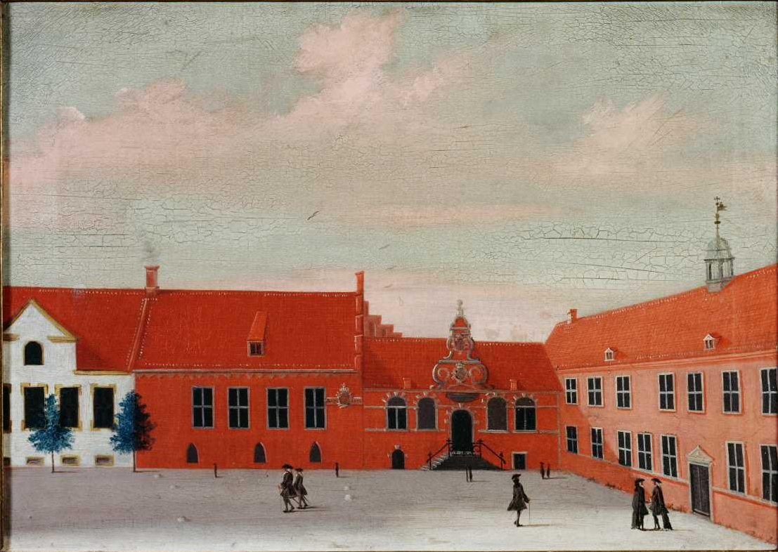 Studiegården på Frue Plads.Til venstre ses en professorresidens, derefter følger Konsistoriehuset med fangekældre og yderst til højre auditoriebygningen.